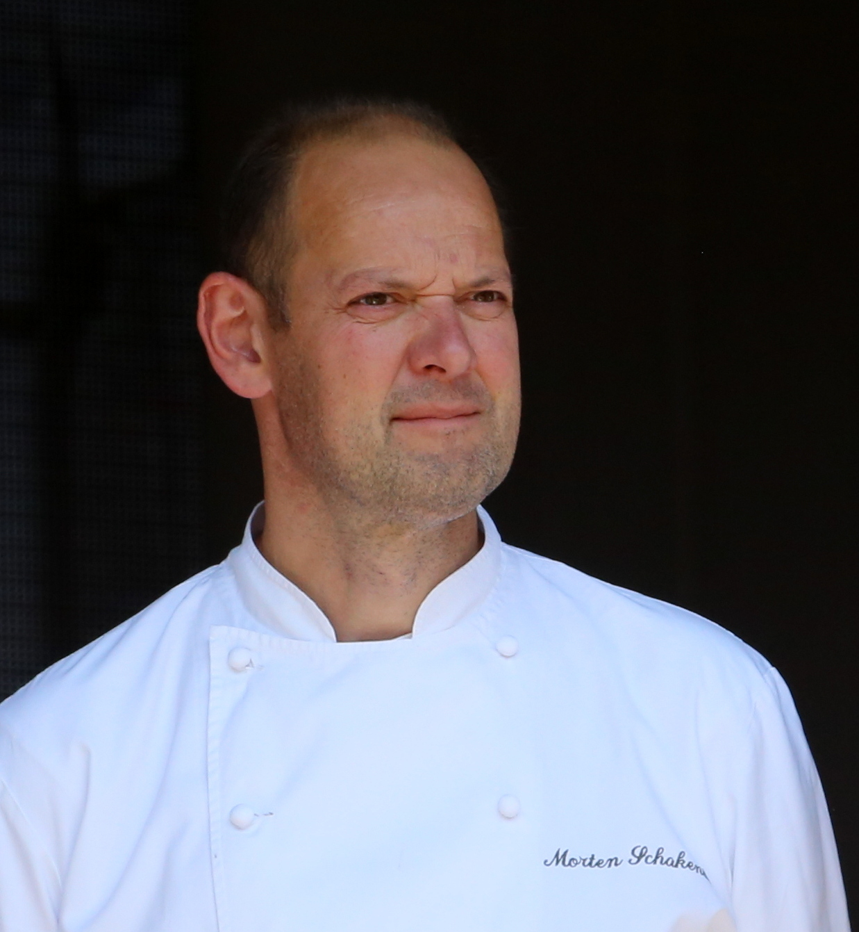 Morten Schakenda under Gladmat 2014